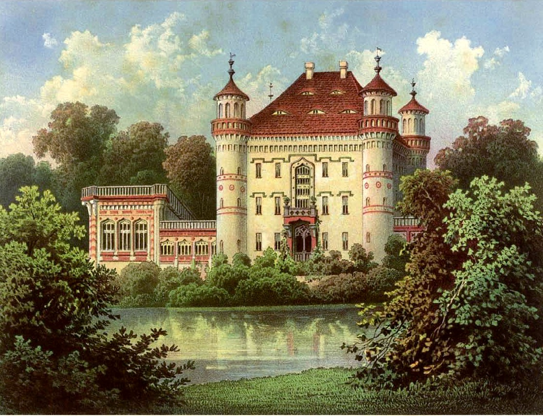 Schloss Schildau, Kreis Schönau, Provinz Schlesien